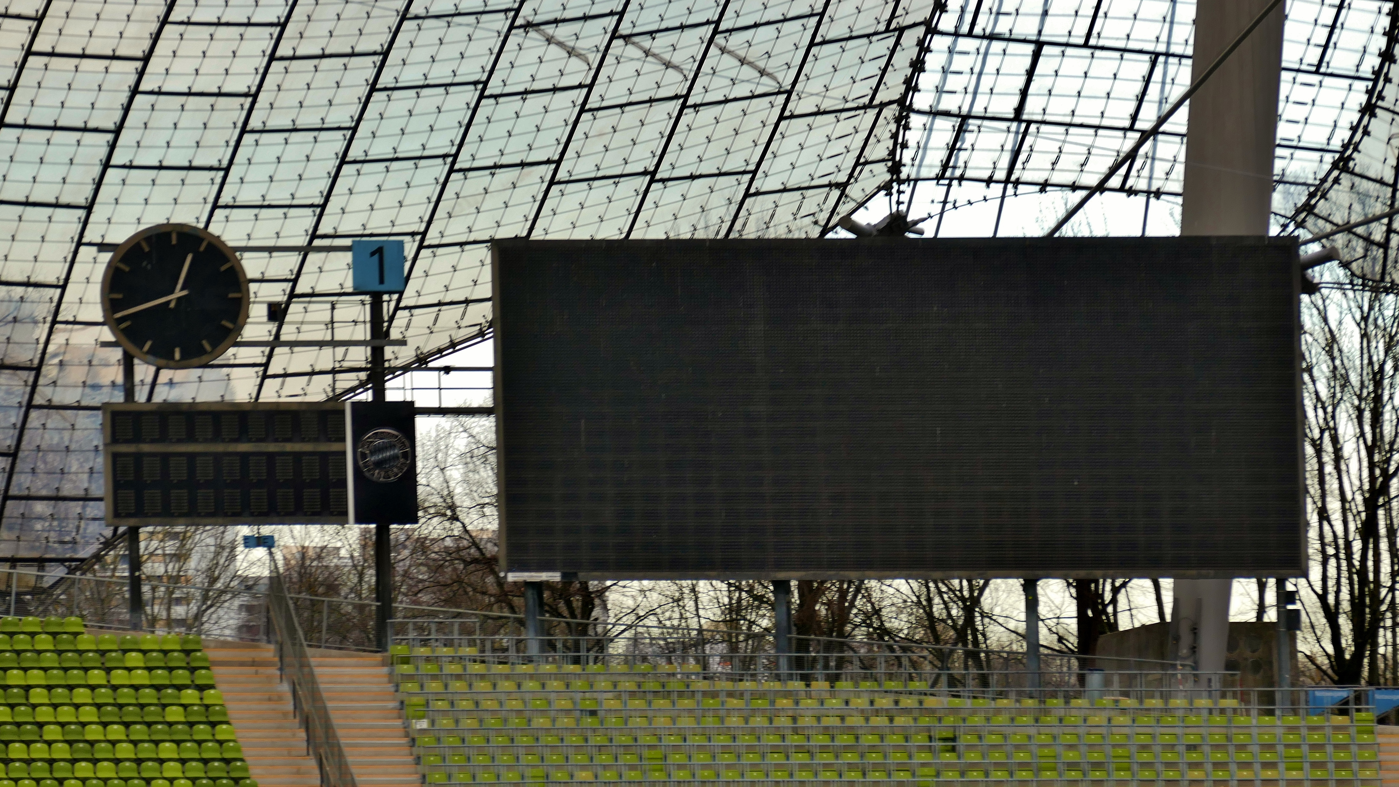 Eine Anzeigetafel des Olympiastadion Münchens. Links sind je eine Kurzzeituhr und eine Normalzeituhr.